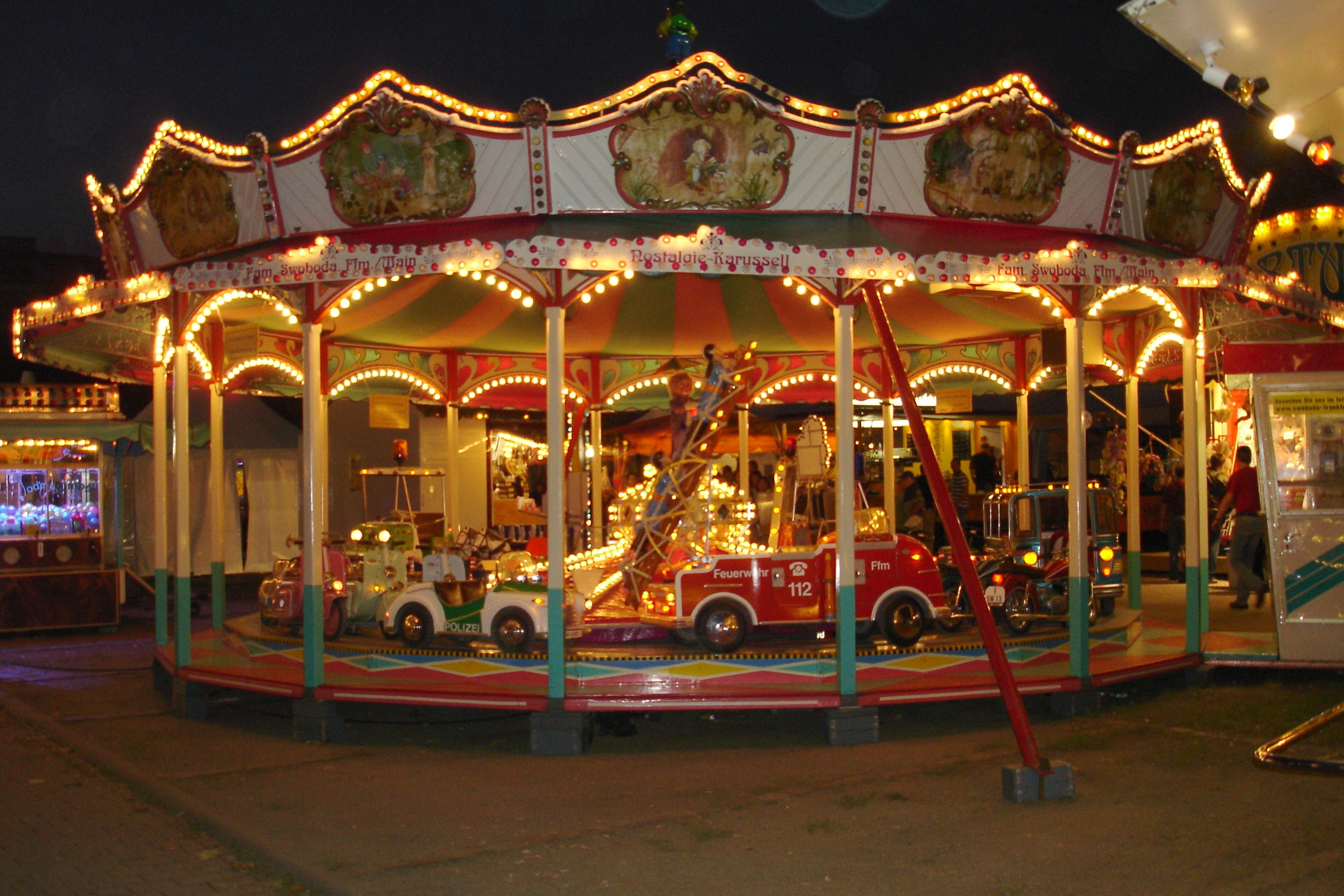 Kinderkarussell auf dem Berger Markt bei Nacht